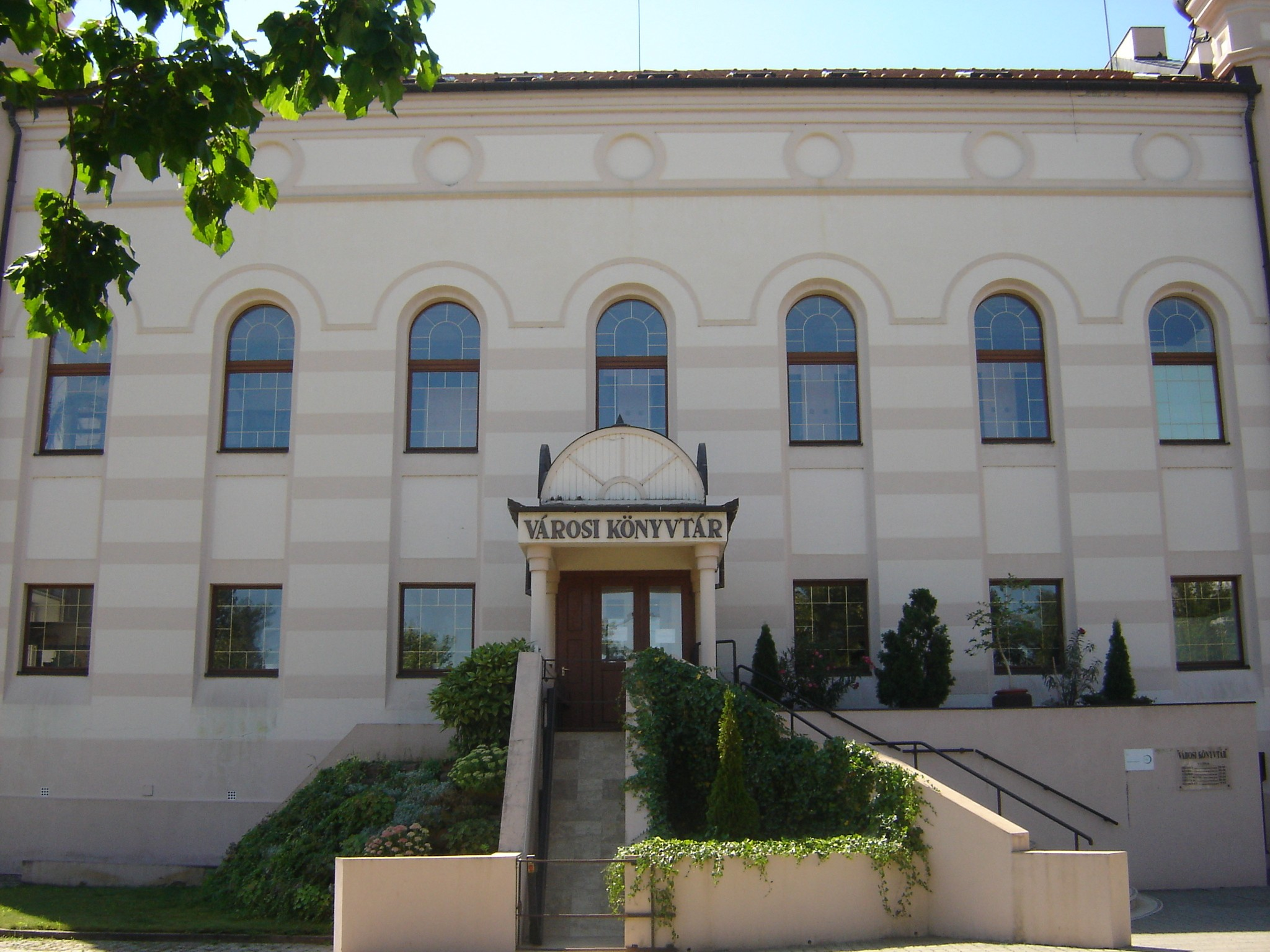 Szentesi zsinagóga A Városi Könyvtár bejárata Pataki Márta felvétele